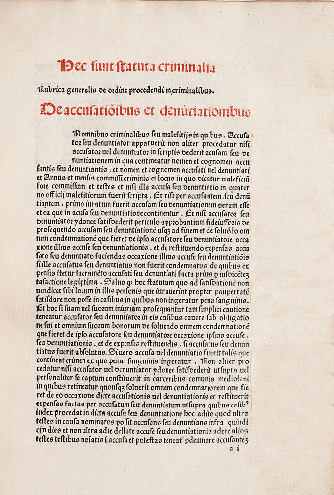 Liber statutorum inclite civitatis Mediolani, 1480